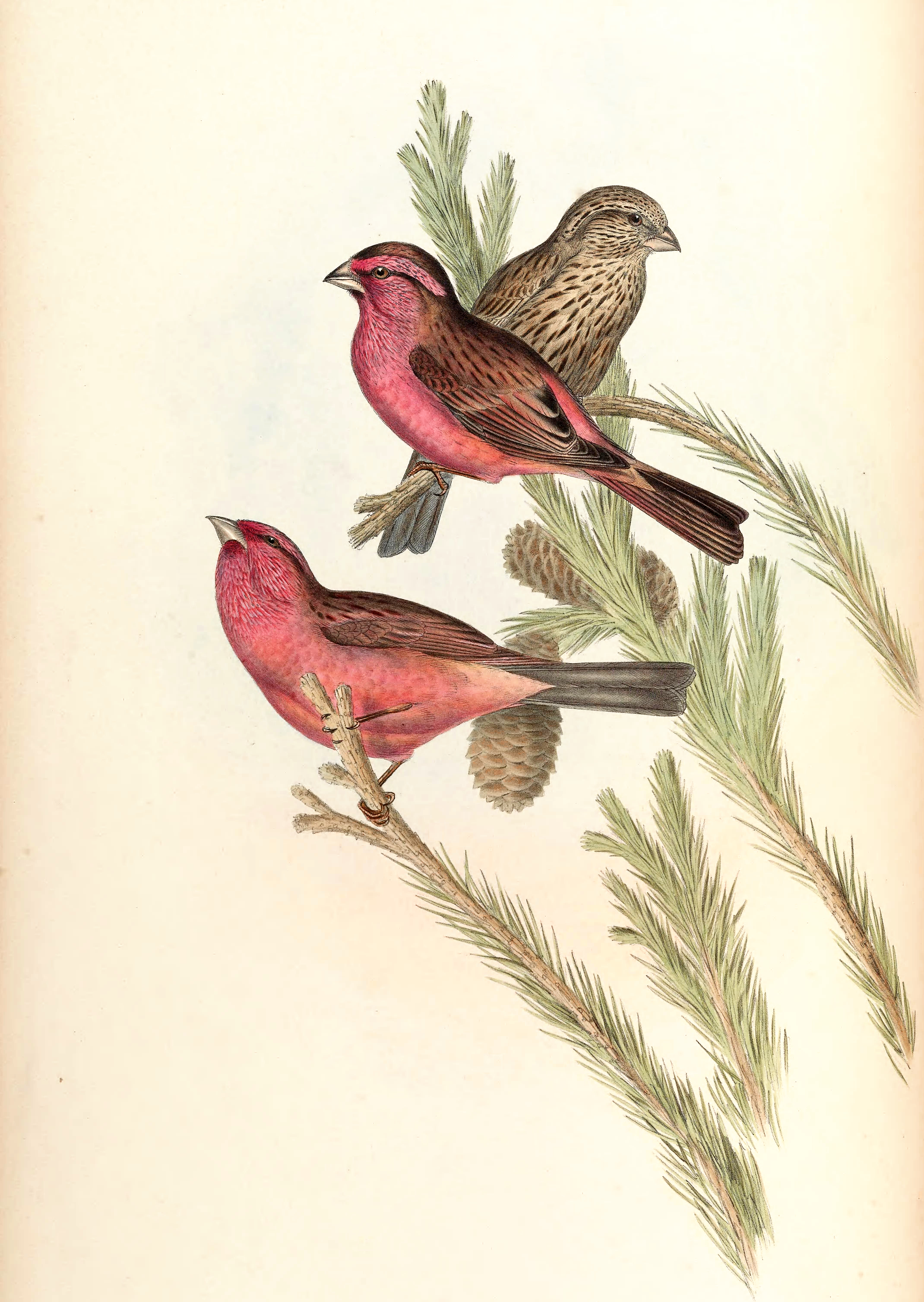 Red-mantled Rosefinch (Blyth's Rosefinch) Carpodacus rhodochlamys Blyth